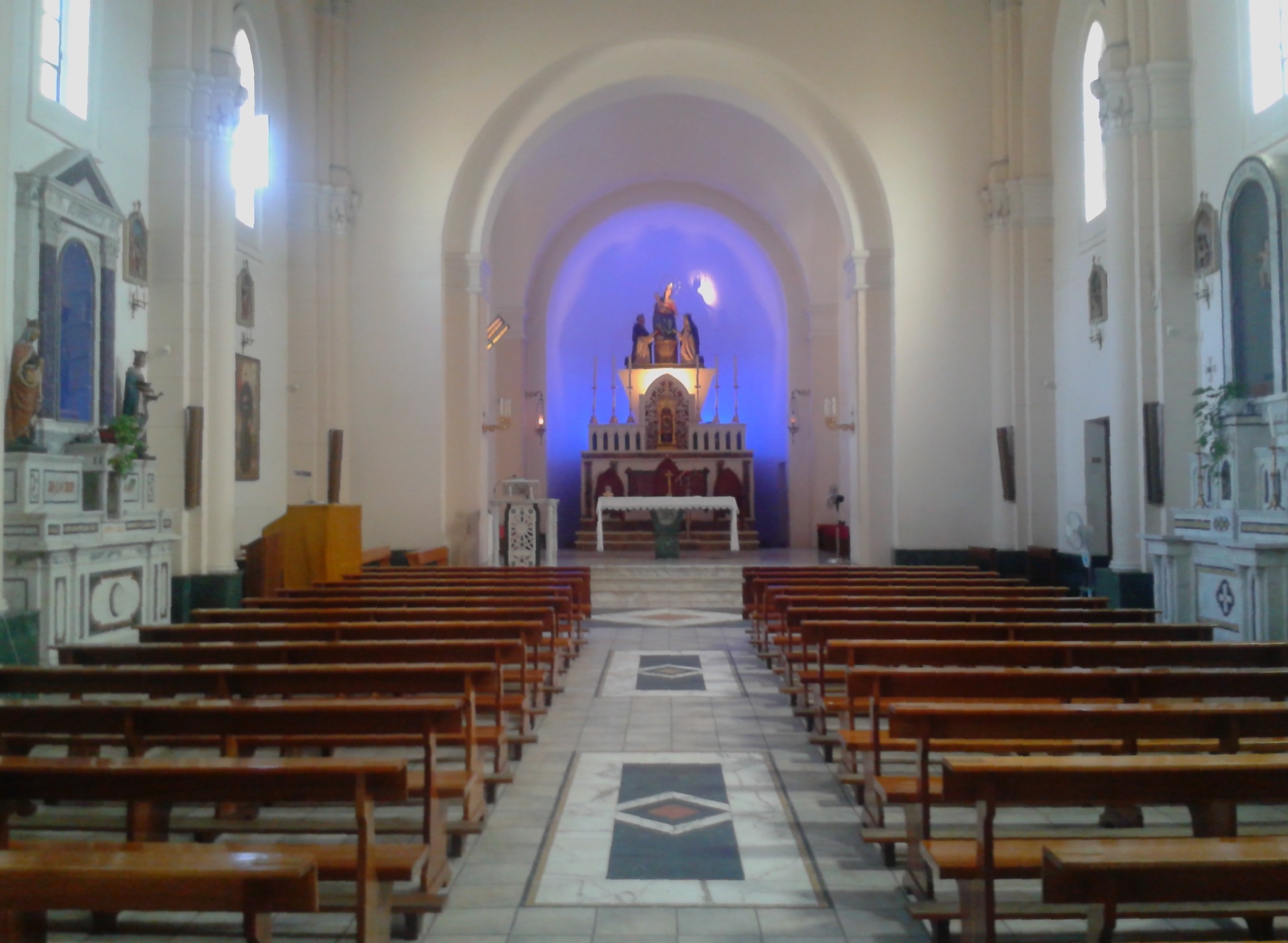 Interno chiesa del Rosario di Palmi